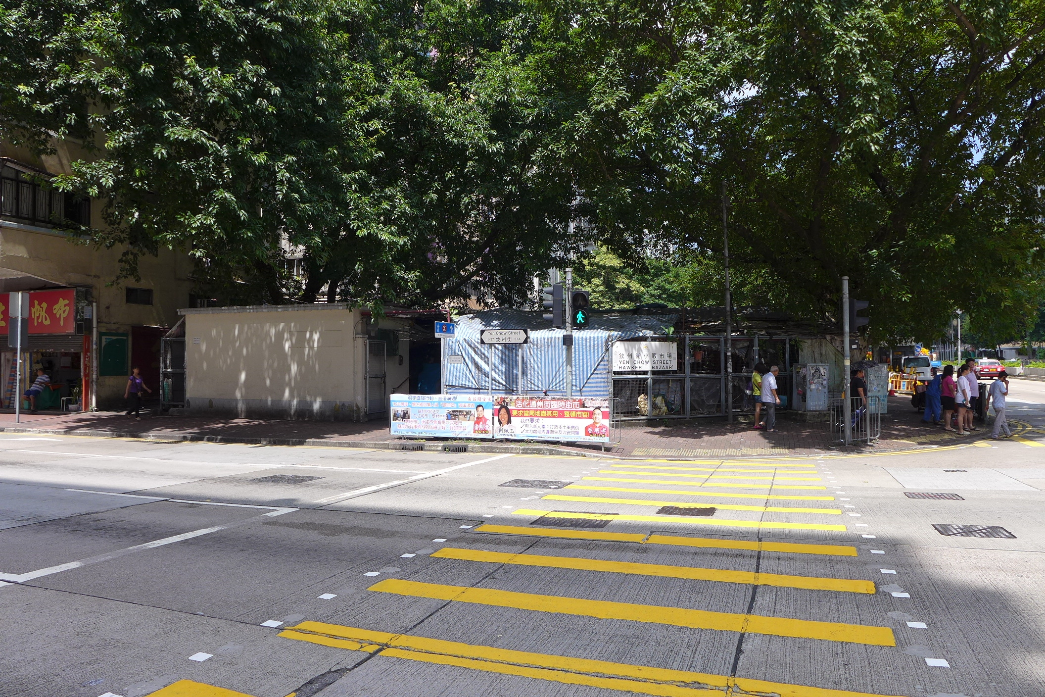 Yen Chow Street Hawker Bazaar